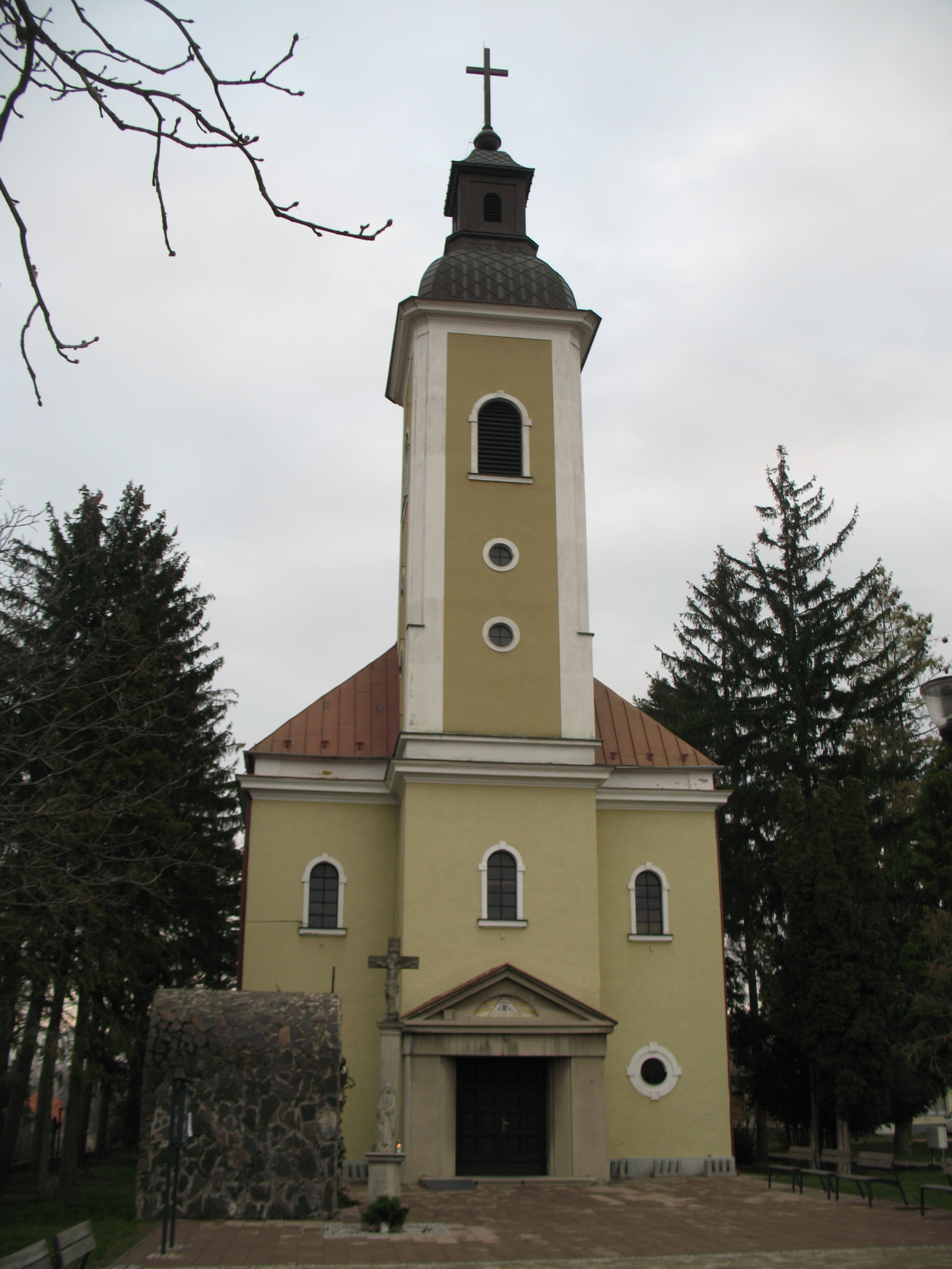 Berencs